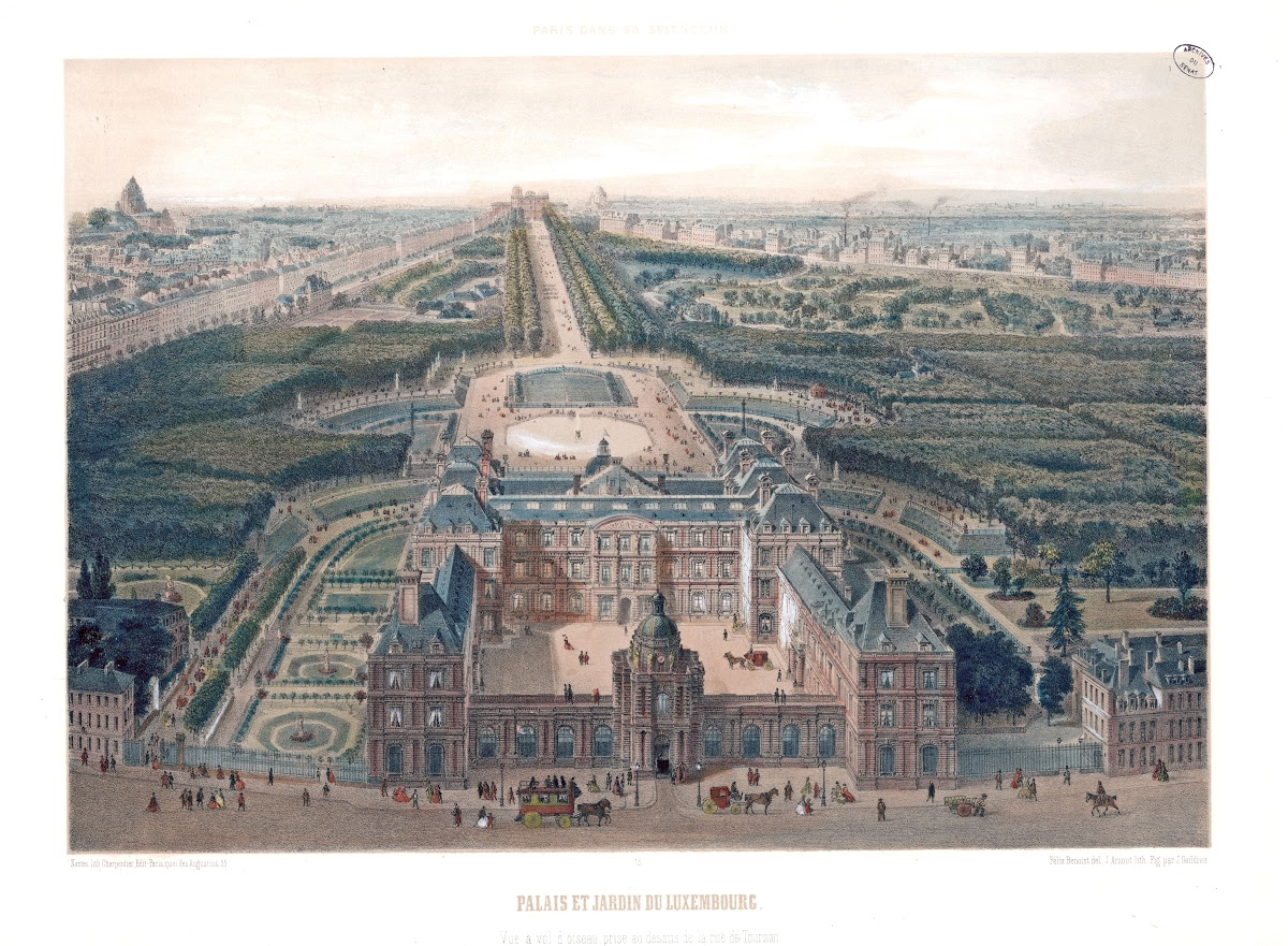 Vue à "vol d'oiseau" prise au dessus de la rue de Tournon